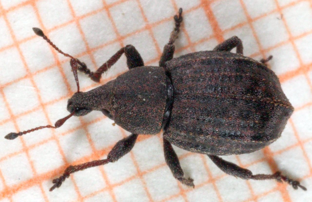 Bredsnutebilla Tropiphorus elevatus.Template:Byline